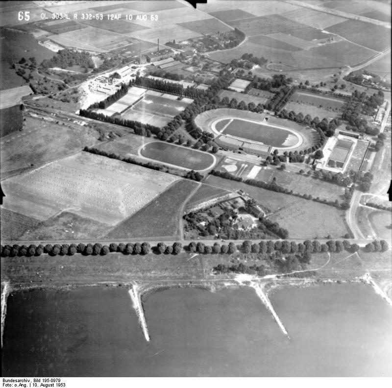 Rheinbefliegung der Alliierten 1953